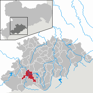 Schwarzenberg/Erzgeb. im Erzgebirgskreis, Sachsen